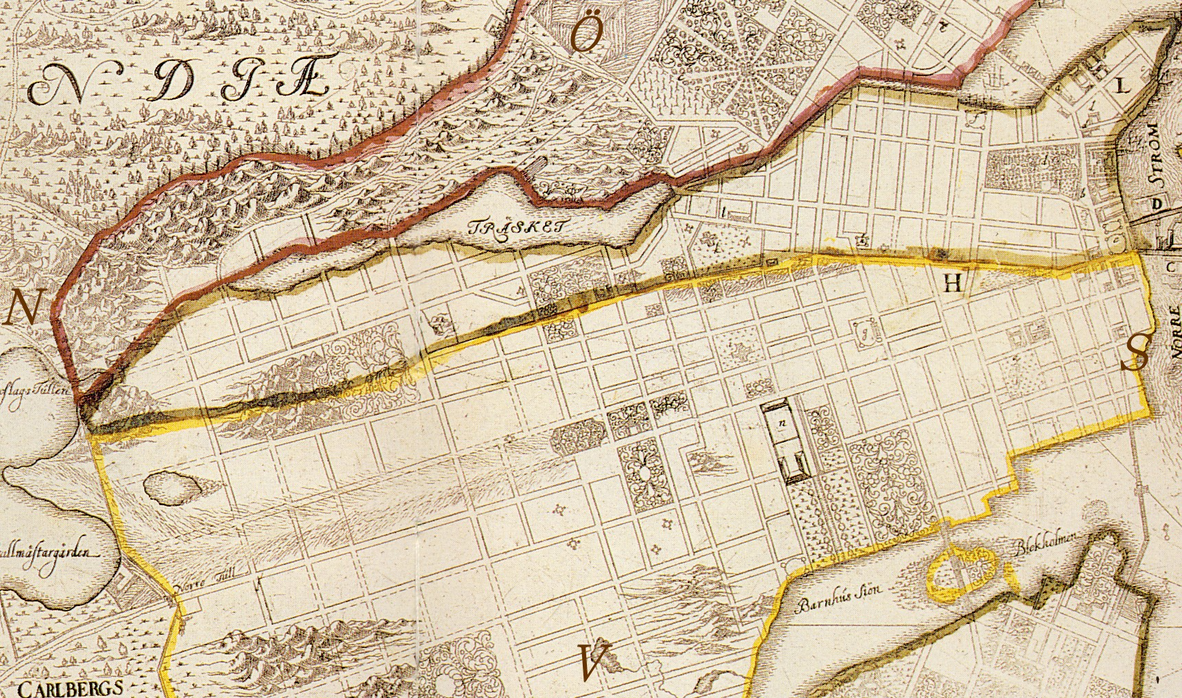 Del av Werner von Rosenfeldts karte från 1702, visande "Träsket" på Norrmalm